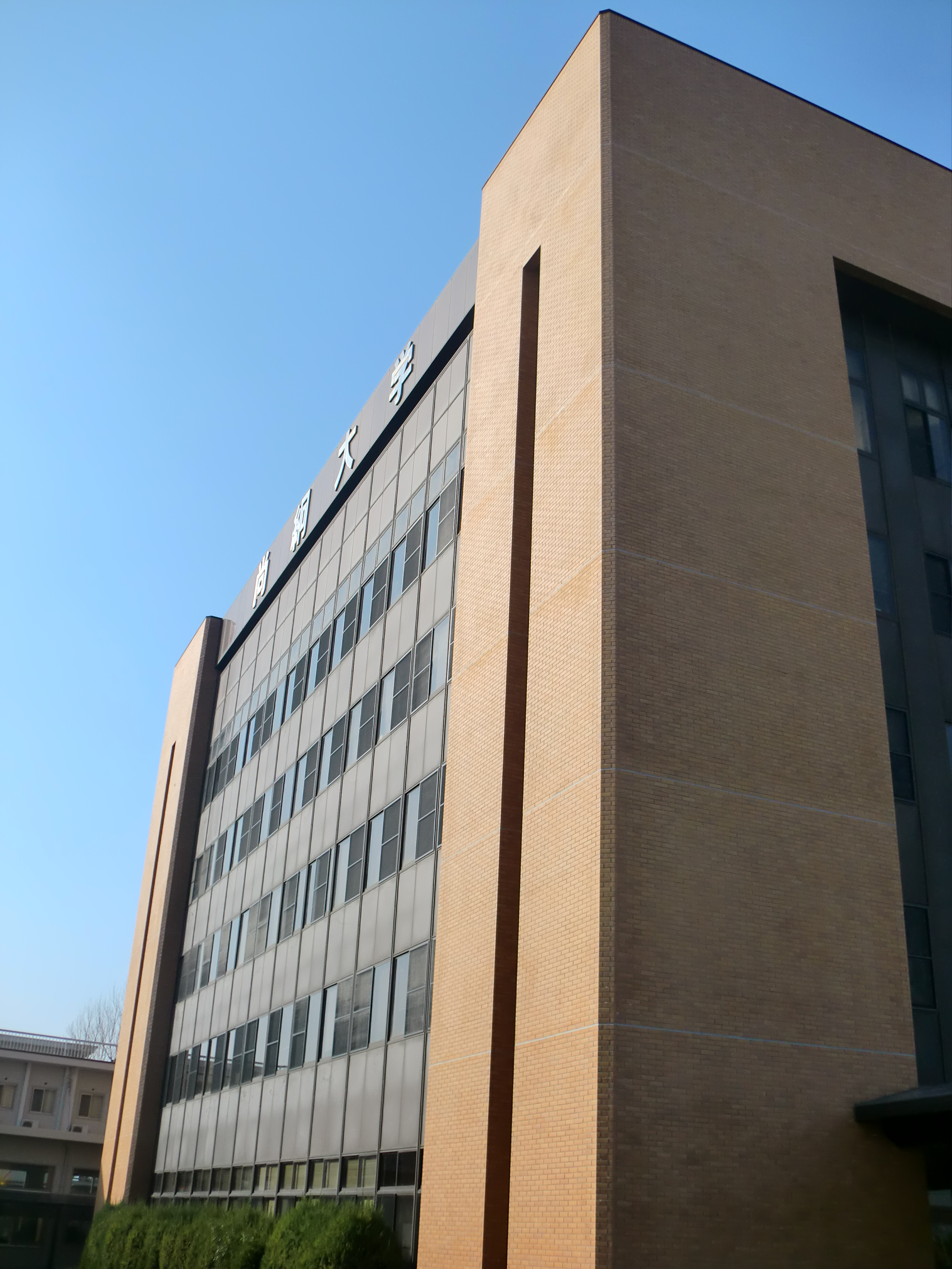 熊本市北区にある尚絅大学楡木キャンパス